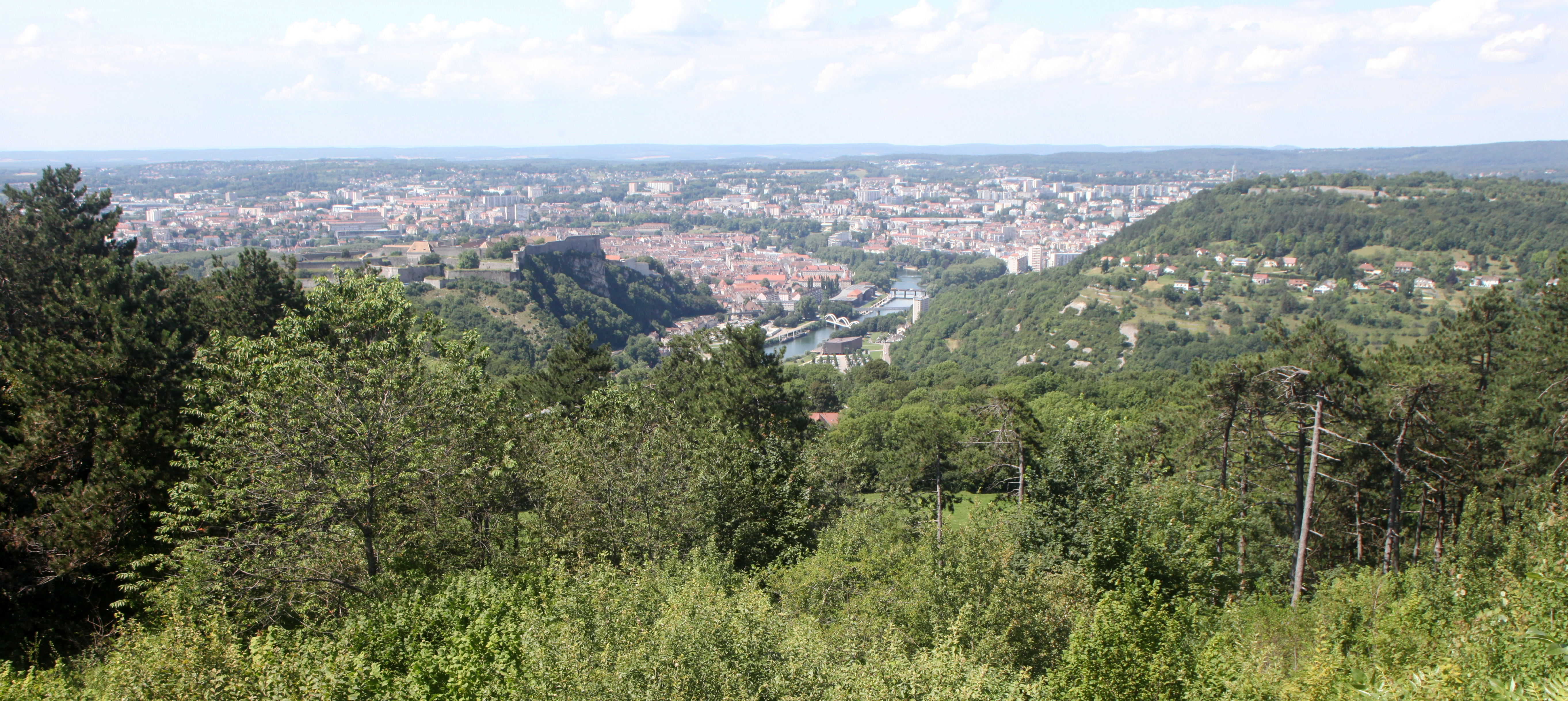 Panorama depuis Notre-Dame de la Libération.